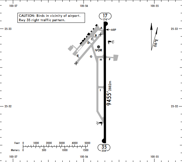 Diagrama SLW